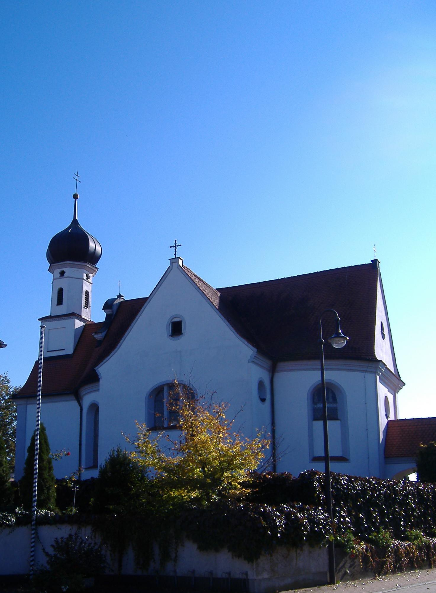 Eggelstetten